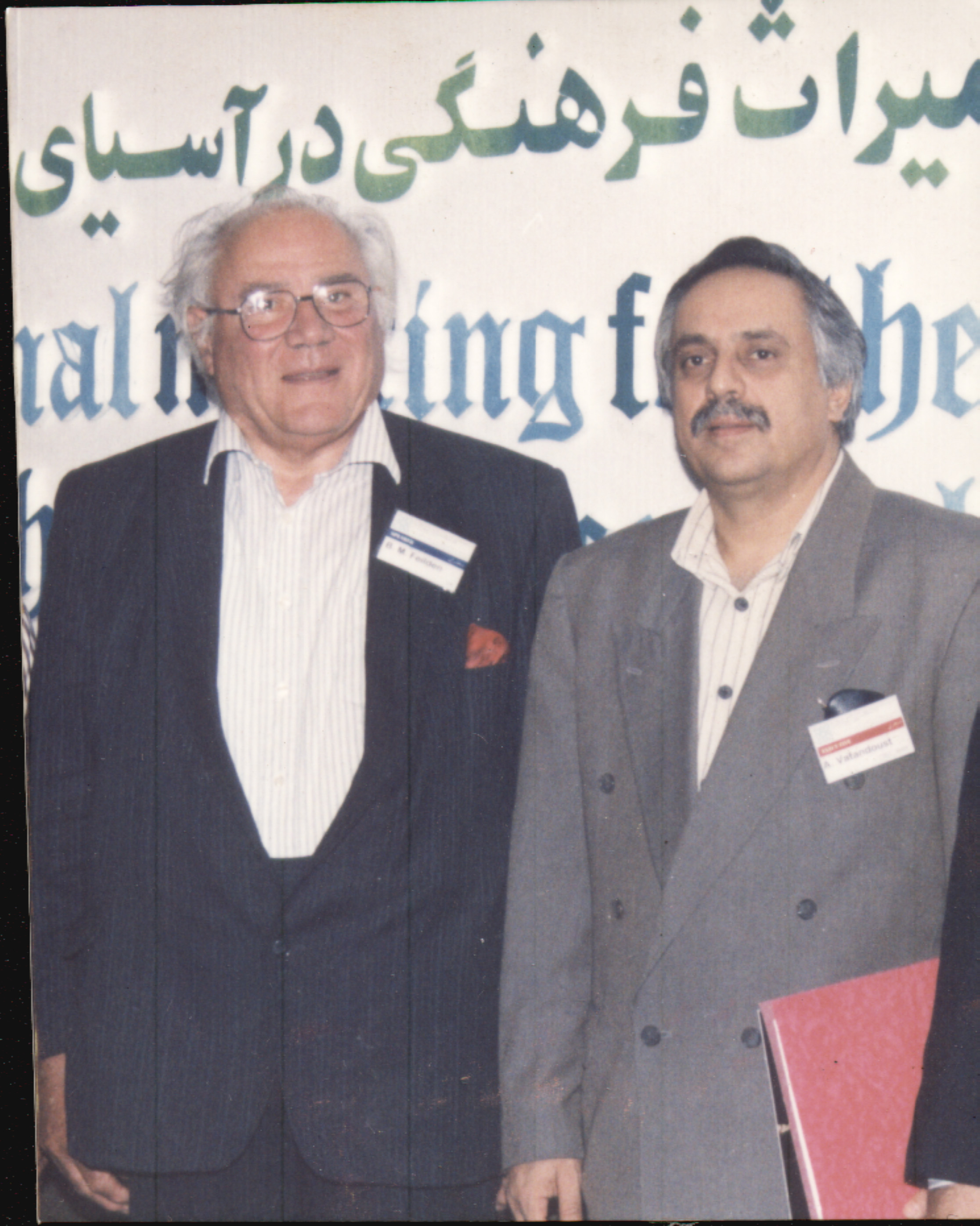 دکتر وطن دوست و پروفسور برنارد فیلدن